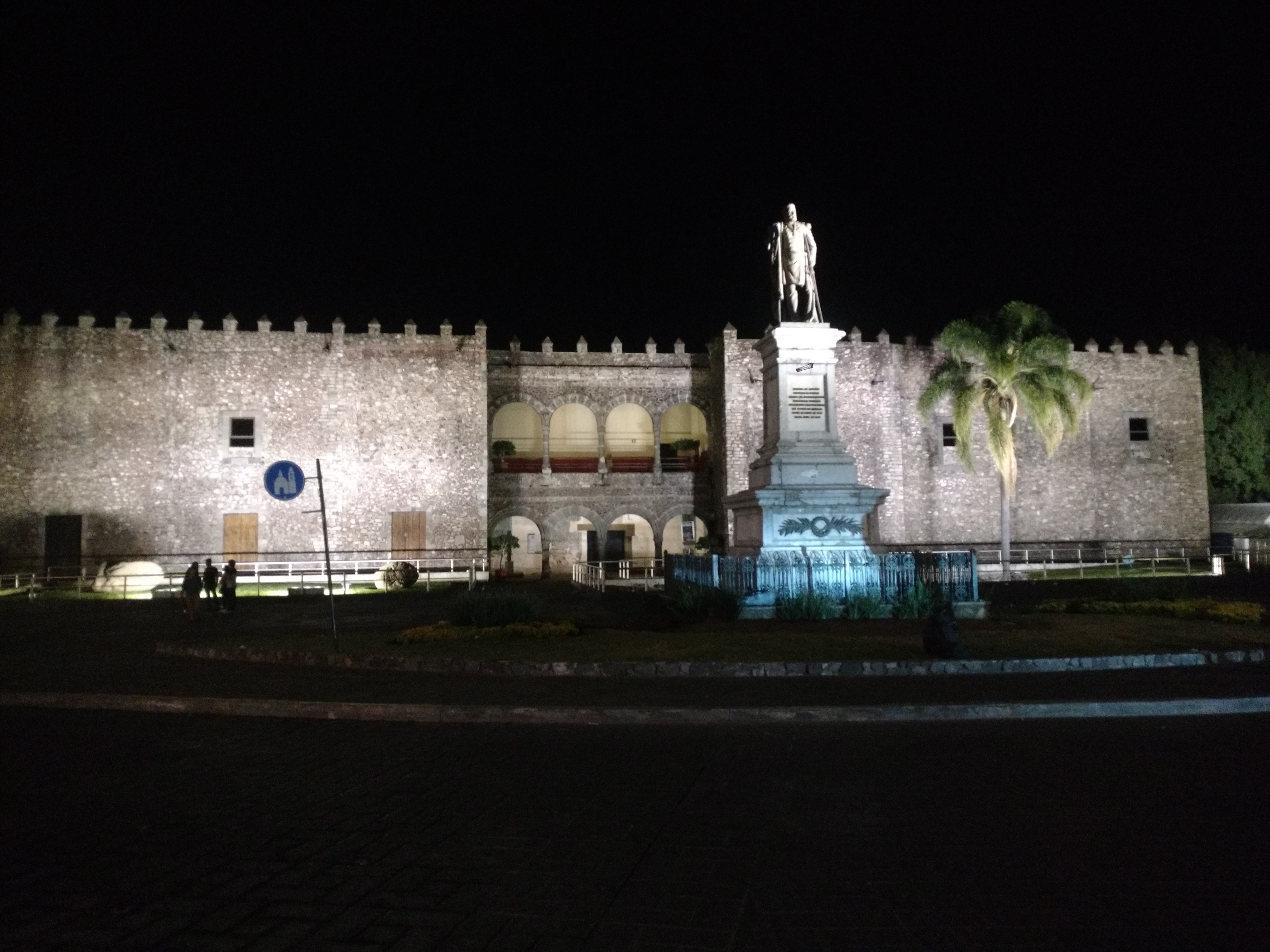 Palacio de Cortés de noche